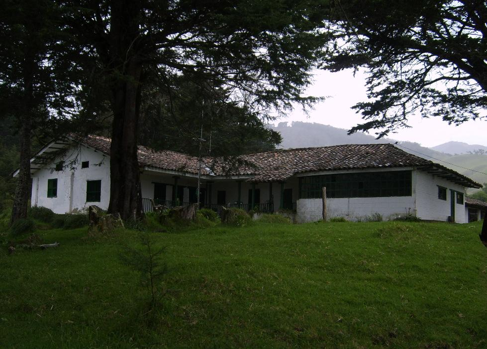 Casa de la hacienda de Paispamba